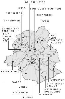 Overzichtskaart van het Brusselse hoofdstedelijke gewest en de 19 gemeenten: Anderlecht, Brussel-stad (inclusief Haren, Laken en Neder-Over-Heembeek), Elsene, Etterbeek, Evere, Ganshoren, Jette, Koekelberg, Oudergem, Schaarbeek, Sint-Agatha-Berchem, Sint-Gillis, Sint-Jans-Molenbeek, Sint-Joost-ten-Node, Sint-Lambrechts-Woluwe, Sint-Pieters-Woluwe, Ukkel, Vorst en Watermaal-Bosvoorde.